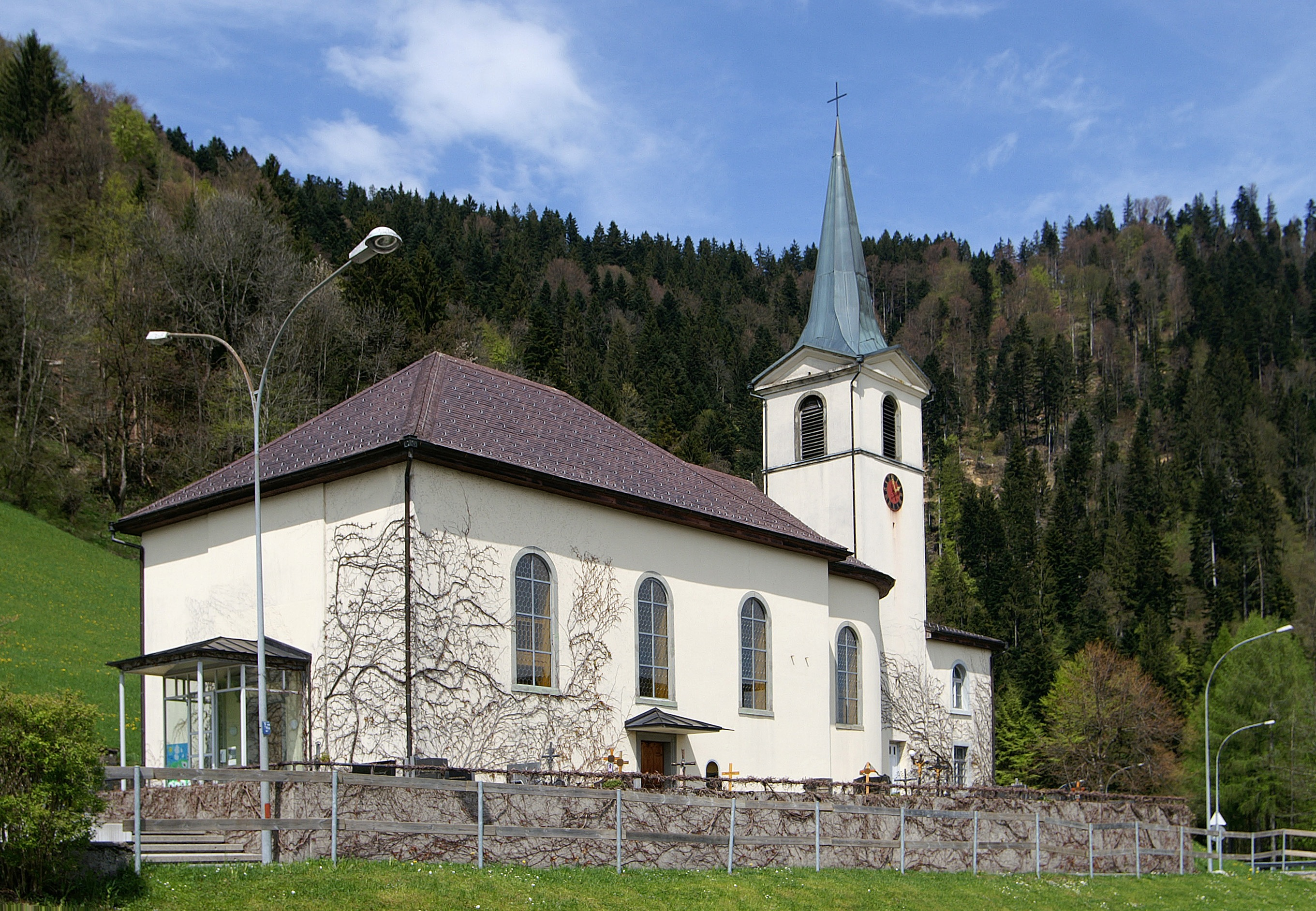 Pfarrkirche hl. Wendelin (Wallfahrtskirche),erbaut 1846 nach Plänen von Gabriel Mallaun, in der Fluh von Bregenz, Vorarlberg.